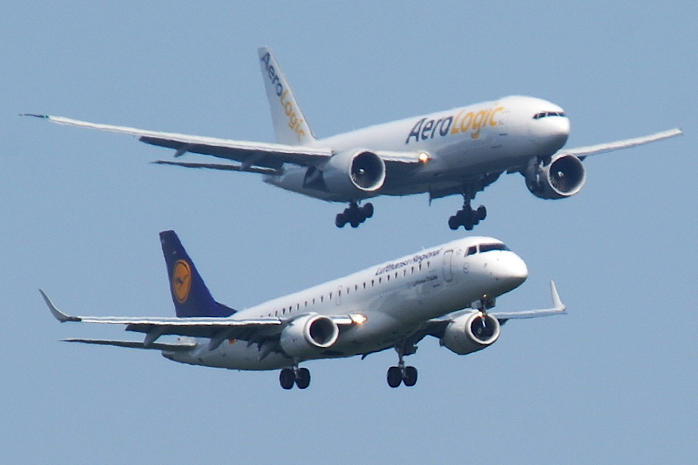 Lufthansa Regional Embraer ERJ-190; D-AECD@FRA;16.07.2011/609lb